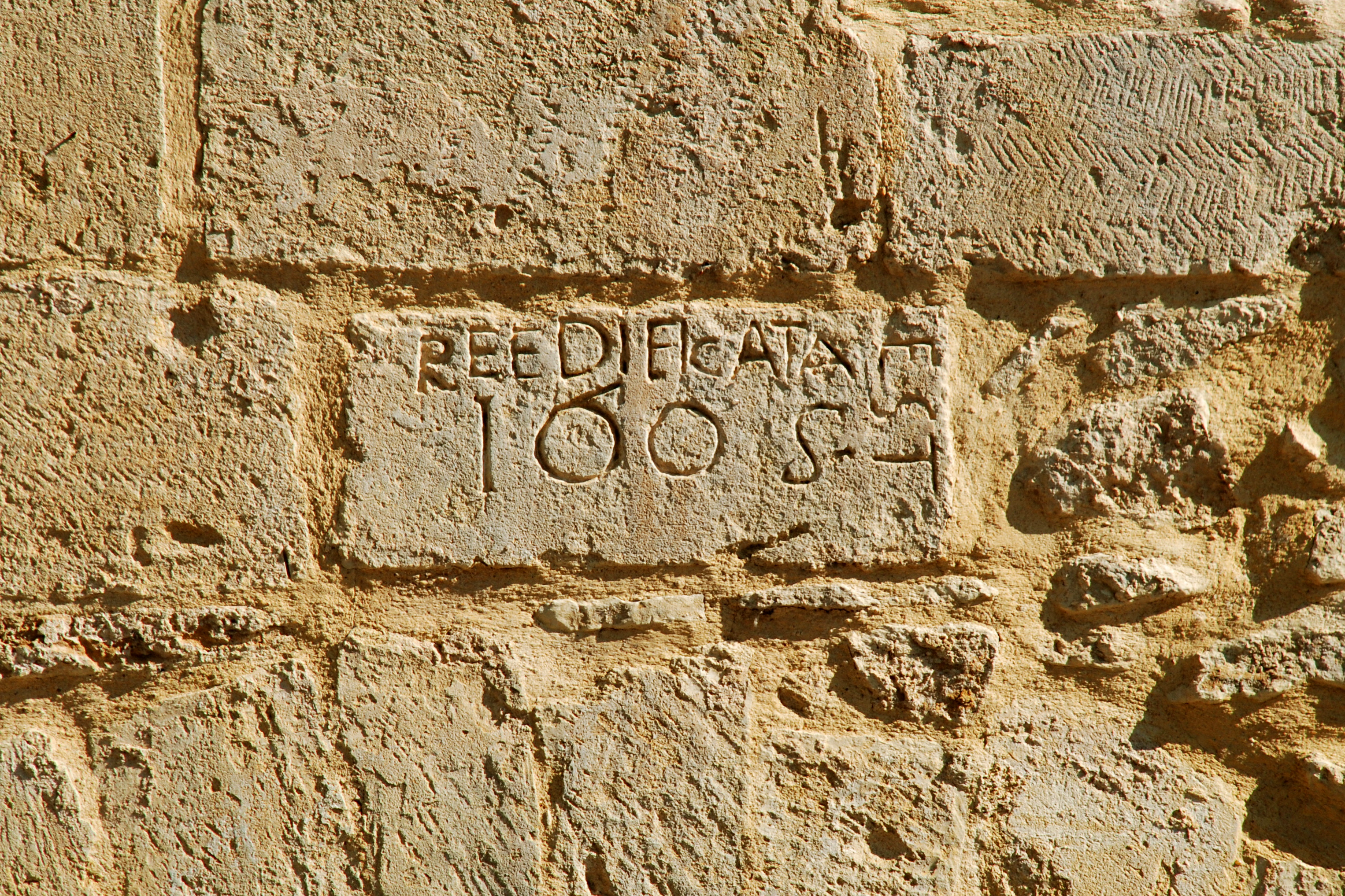 France - Gard - Sabran - Combe - Chapelle Saint-Julien-de-Pistrin